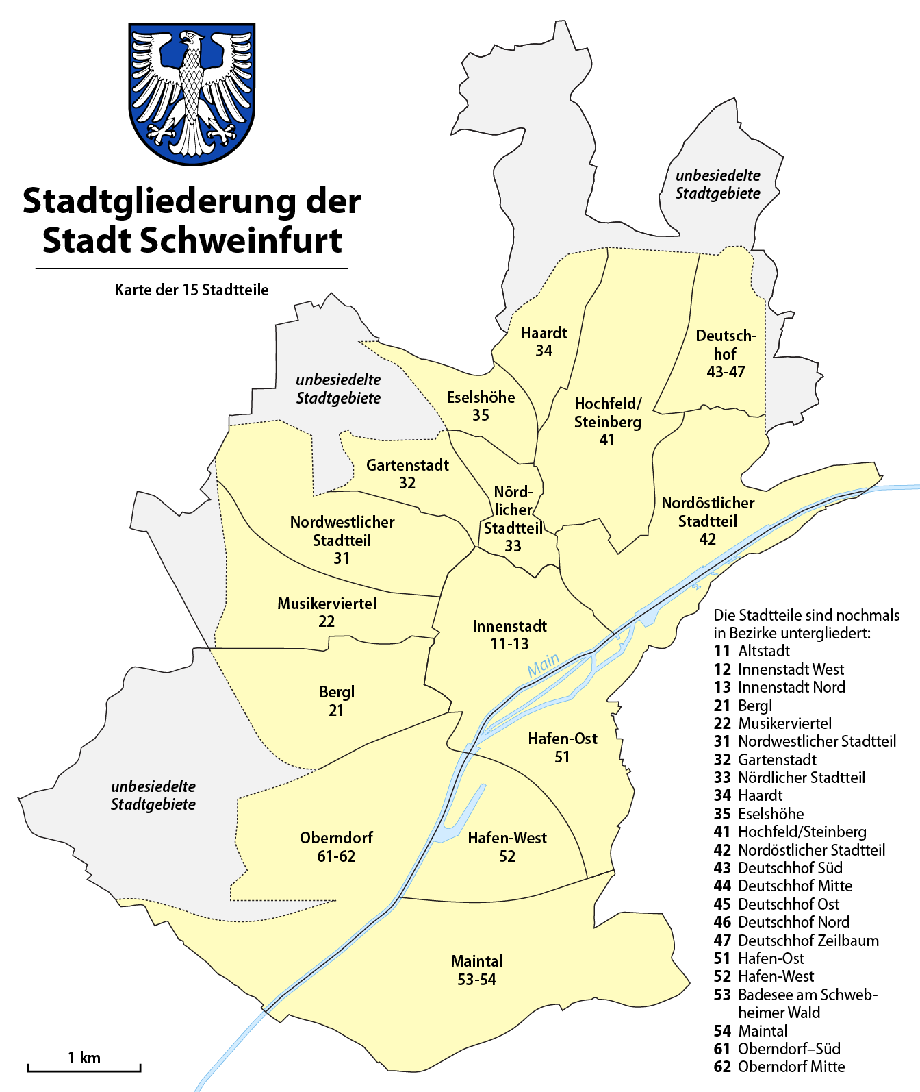 Karte der Stadtgliederung der Stadt Schweinfurt in Stadtteile und Bezirke